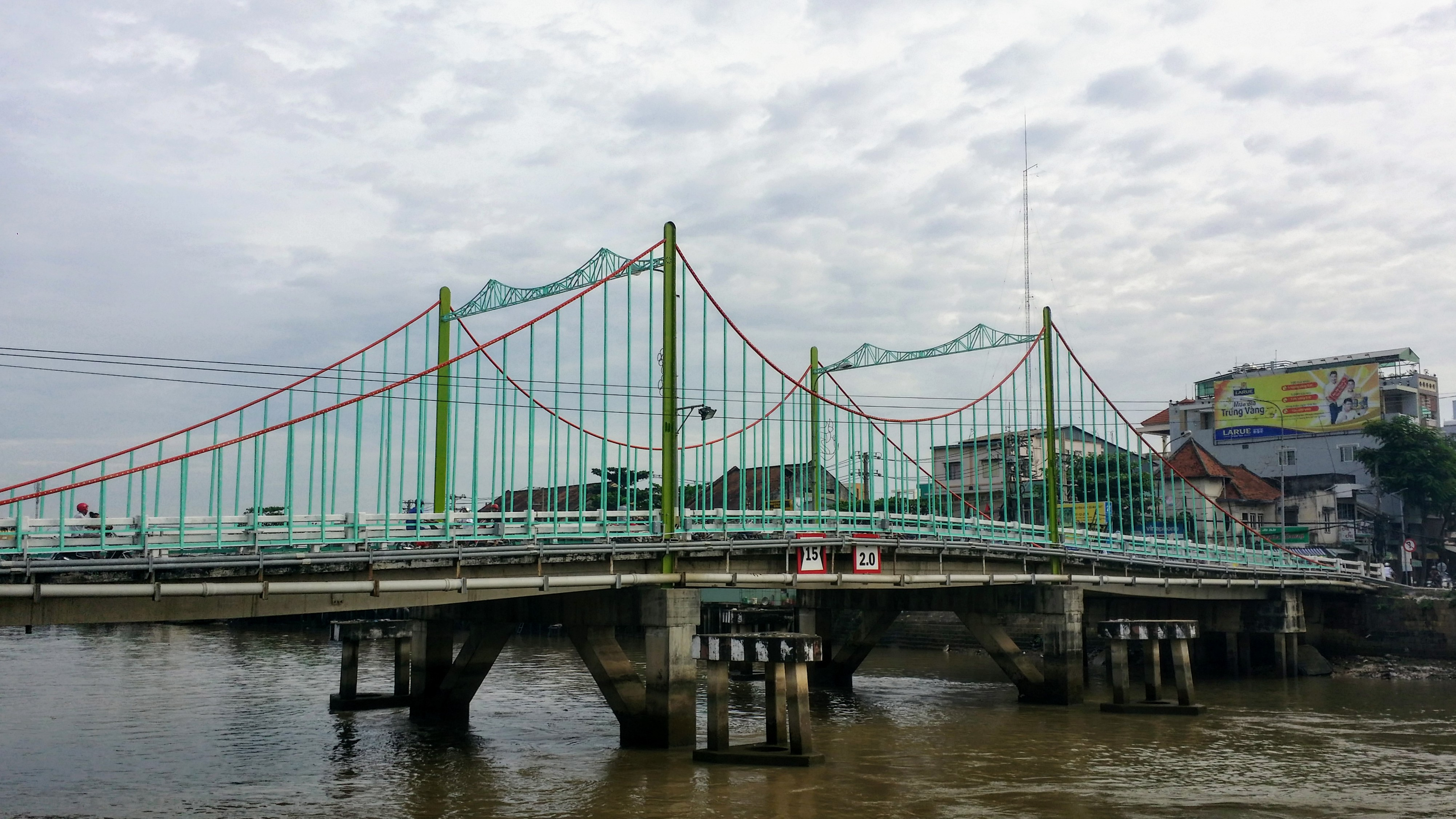 Cầu Quay ở thành phố Mỹ Tho, nối giữa phường 1 và phường 3 bắc qua sông Bảo Định.